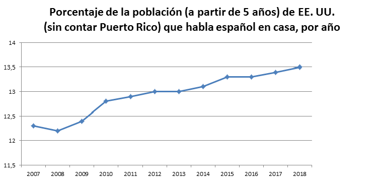 Gráfica del porcentaje de la población a partir de 5 años de edad que habla español en casa en Estados Unidos (excluyendo Puerto Rico) entre 2007 y 2018.